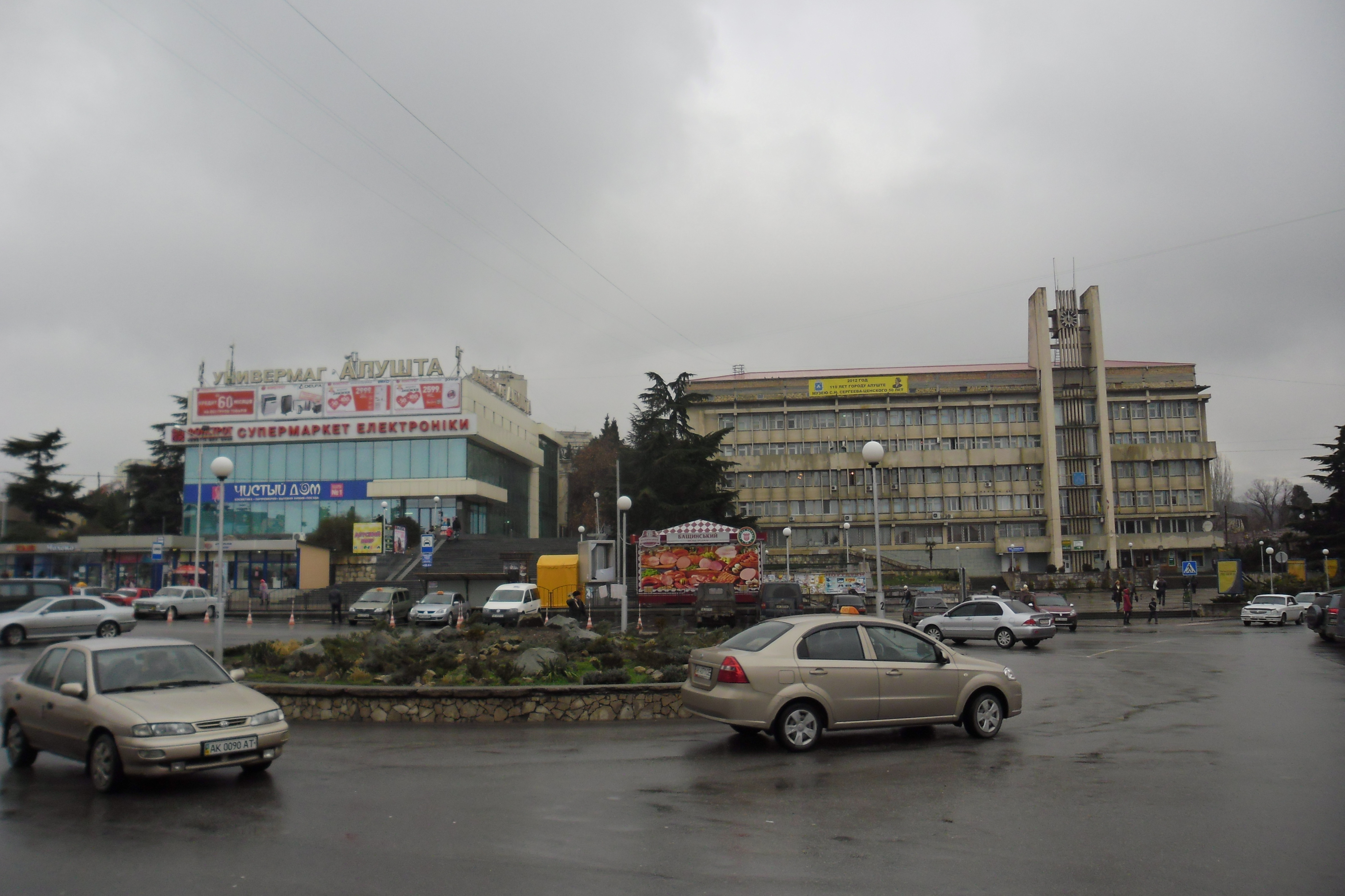 Фото